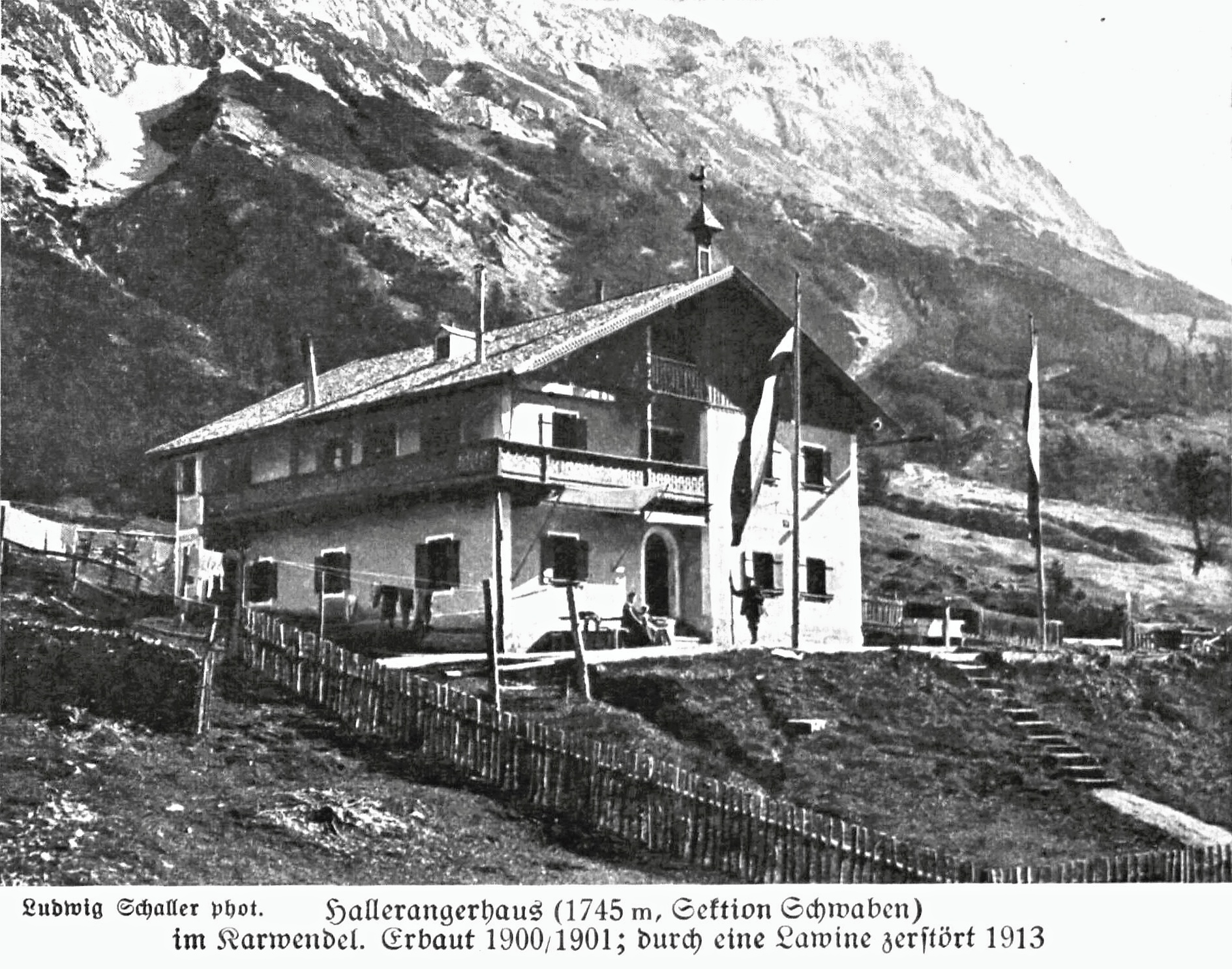 Hallerangerhaus (1745 m, Sektion Schwaben) im Karwendel. Erbaut 1900/1901; durch eine Lawine zerstört 1913. aus Zeitschrift des Deutschen und Oesterreichischen Alpenvereins 1919 Band 50